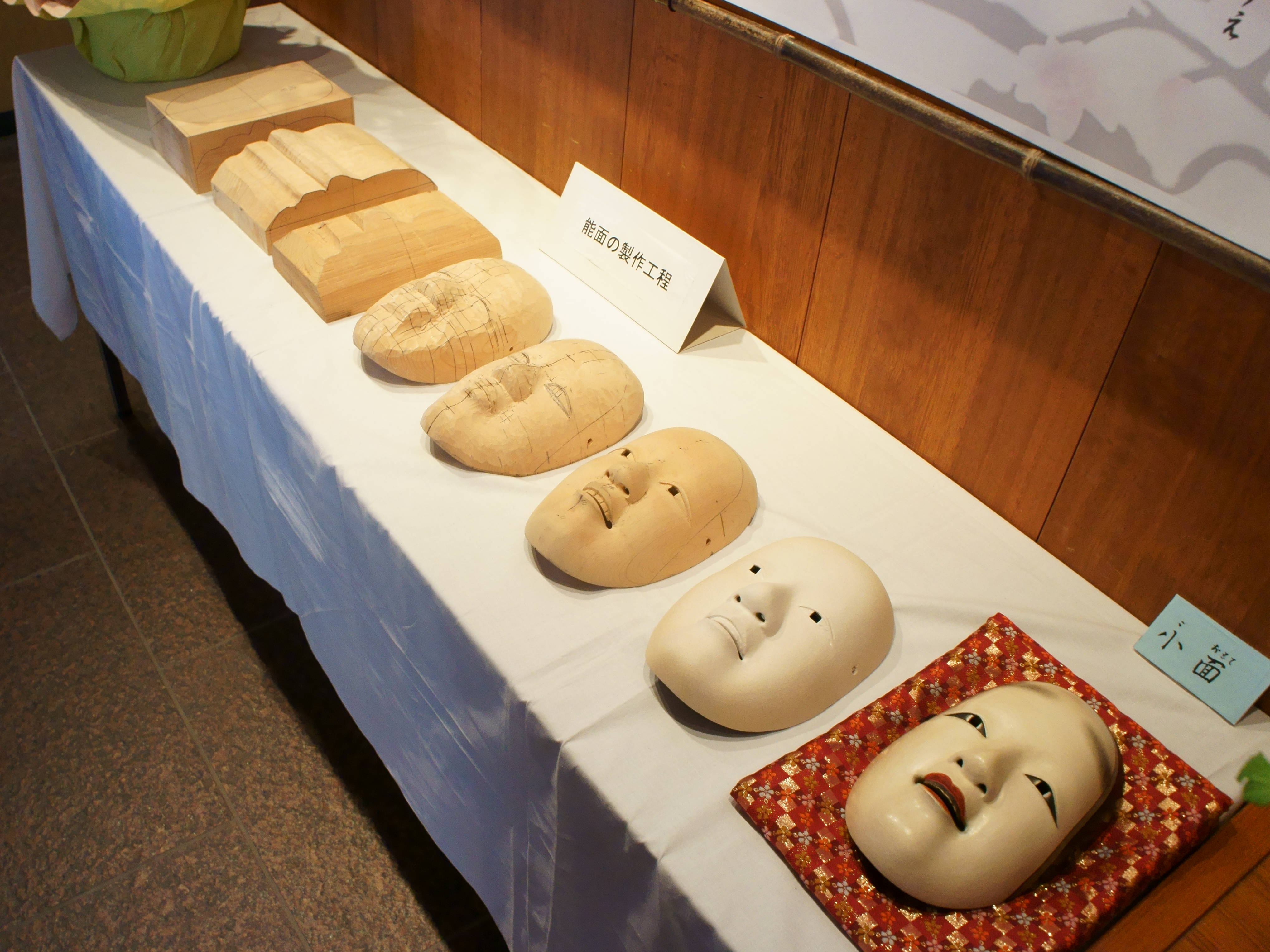 能面の製作工程 茨城県水戸市 偕楽園公園センター「能面展」より